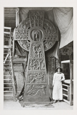 Ellen Roosval von Hallwyl (de Maré) med konstverk